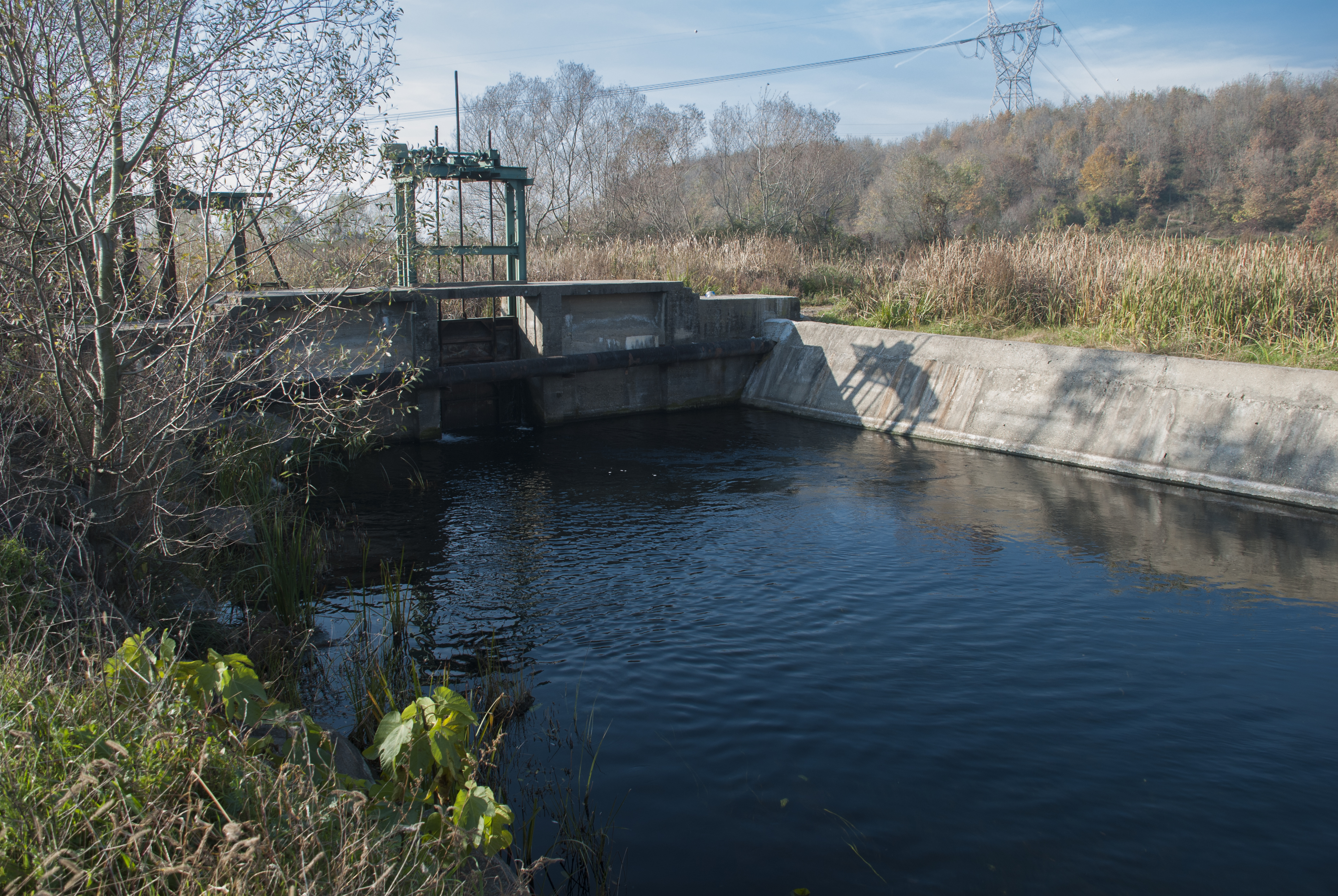 Sapanca Gölünden Çark deresinin doğduğu alan.DSİ tarafından göl seviyesi kontrol